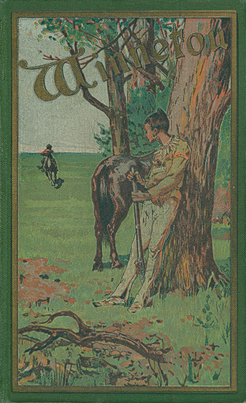 Buchdeckel der klassischen Ausgaben (ab 1898) der Bände Winnetou I bis III von Karl May.